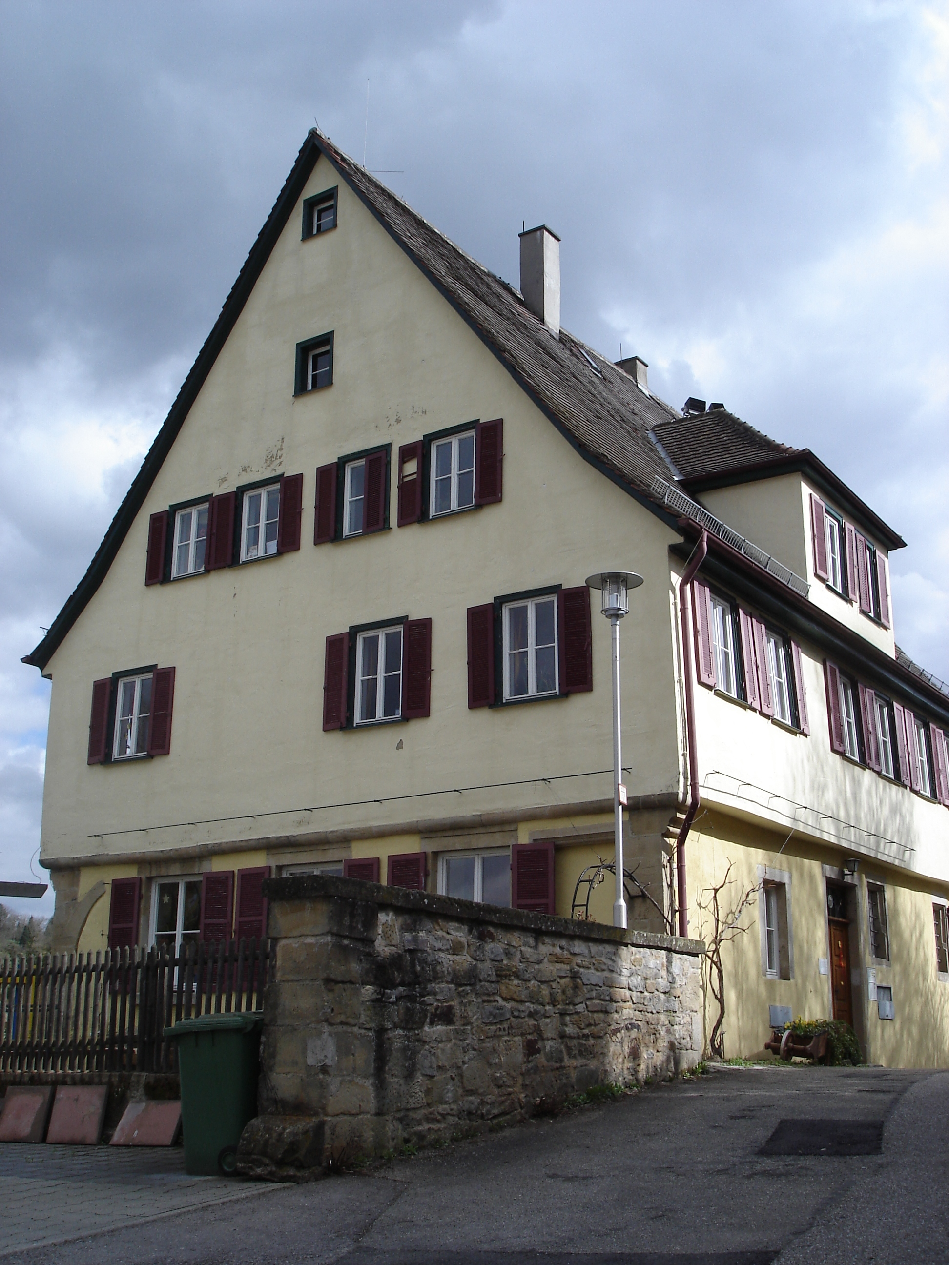 Pfarrhaus in Benningen am Neckar, Geburtshaus des Altphilologen Pauly